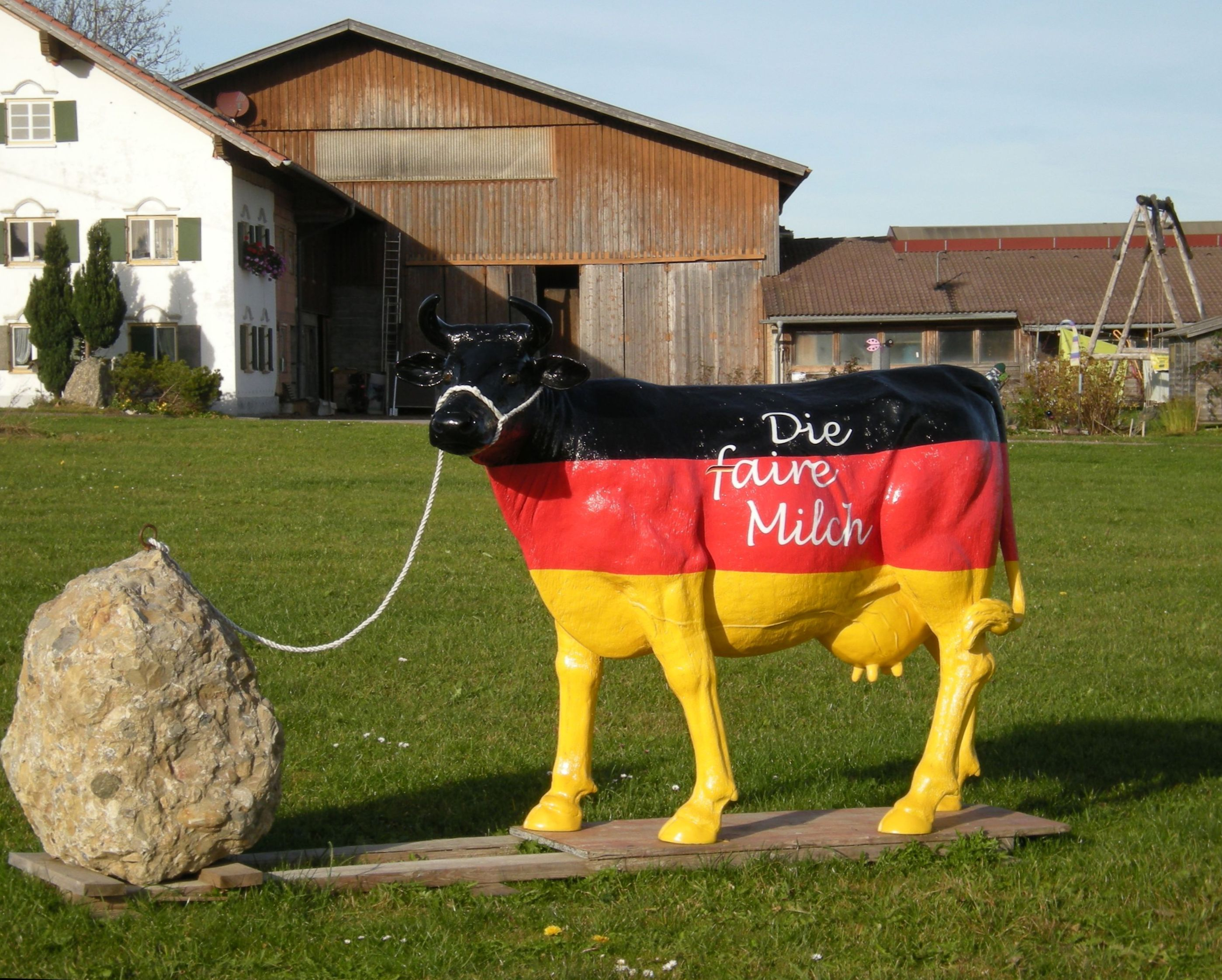 Bauernprotest in Ebersbach für einen fairen Milchpreis.jpg